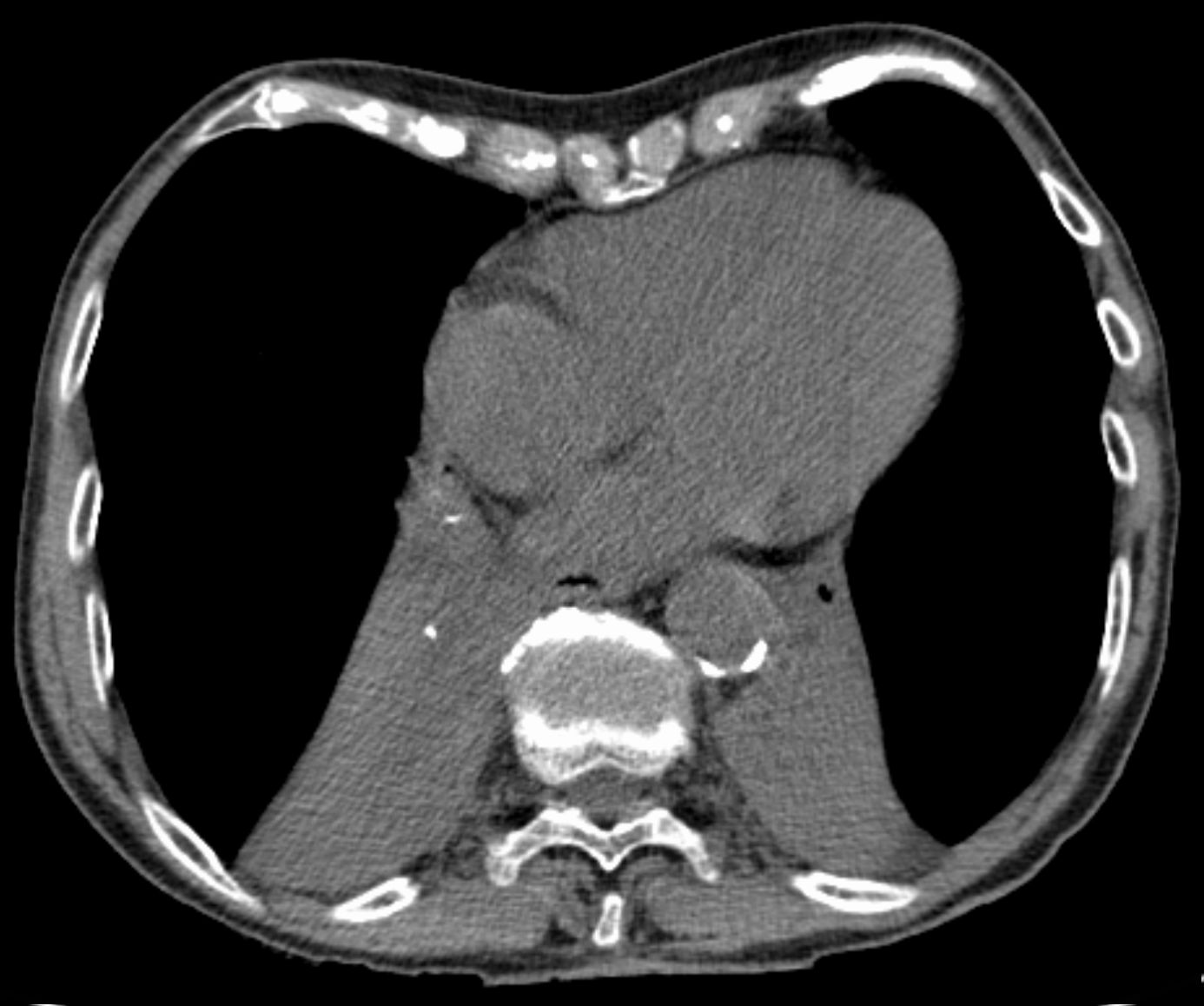 Atelektase des Unterlappens beidseits in der Computertomographie (Weichteilfenster).